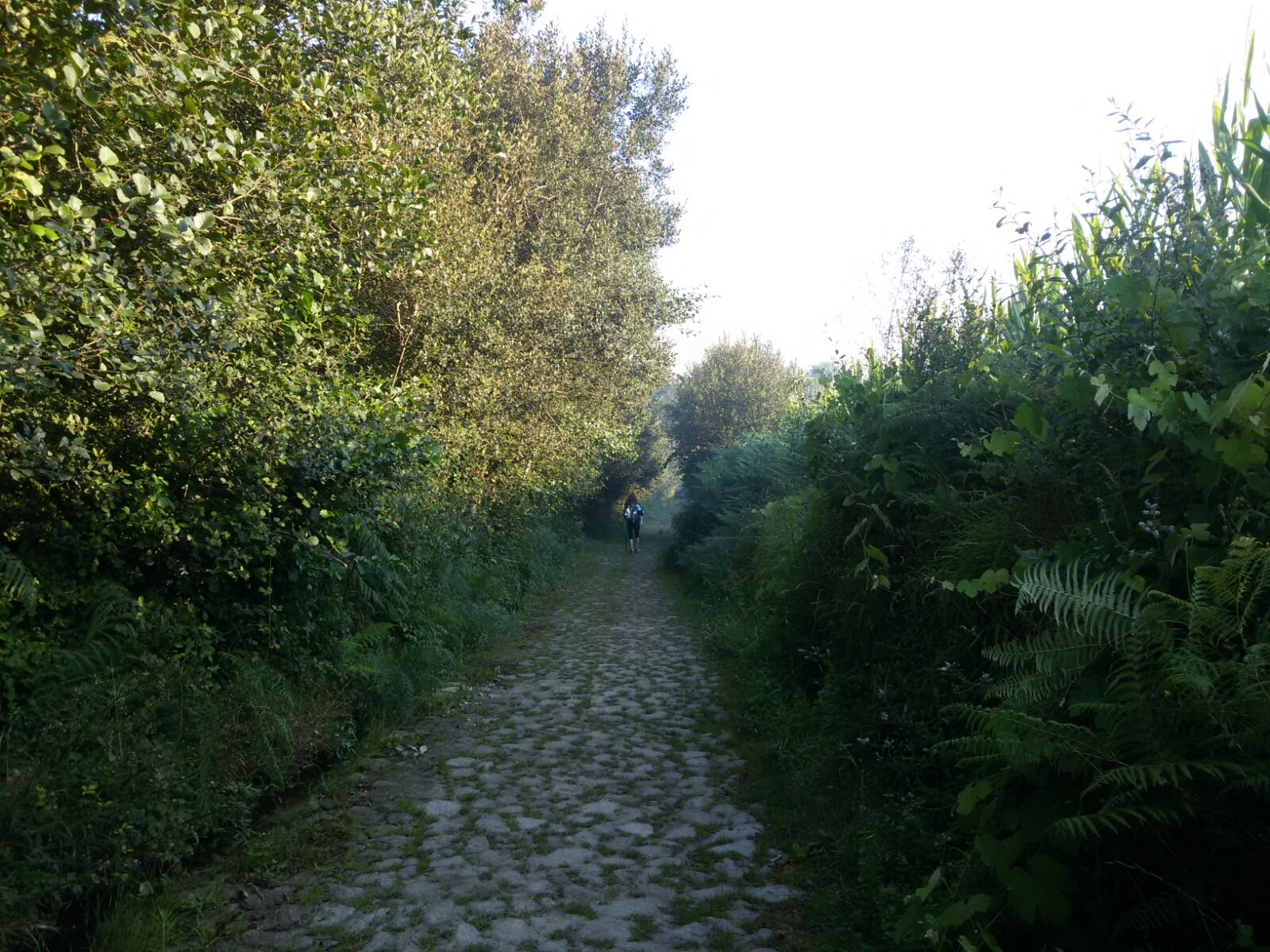 Strada romana lungo il percorso del Cammino Portoghese